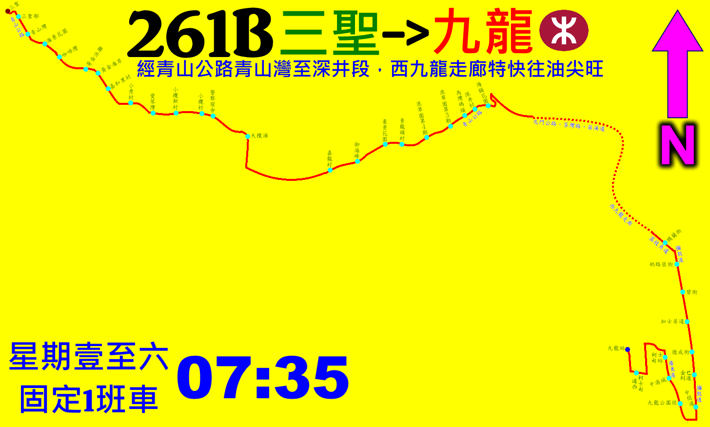 中文（香港）: 九巴261B線的走線圖